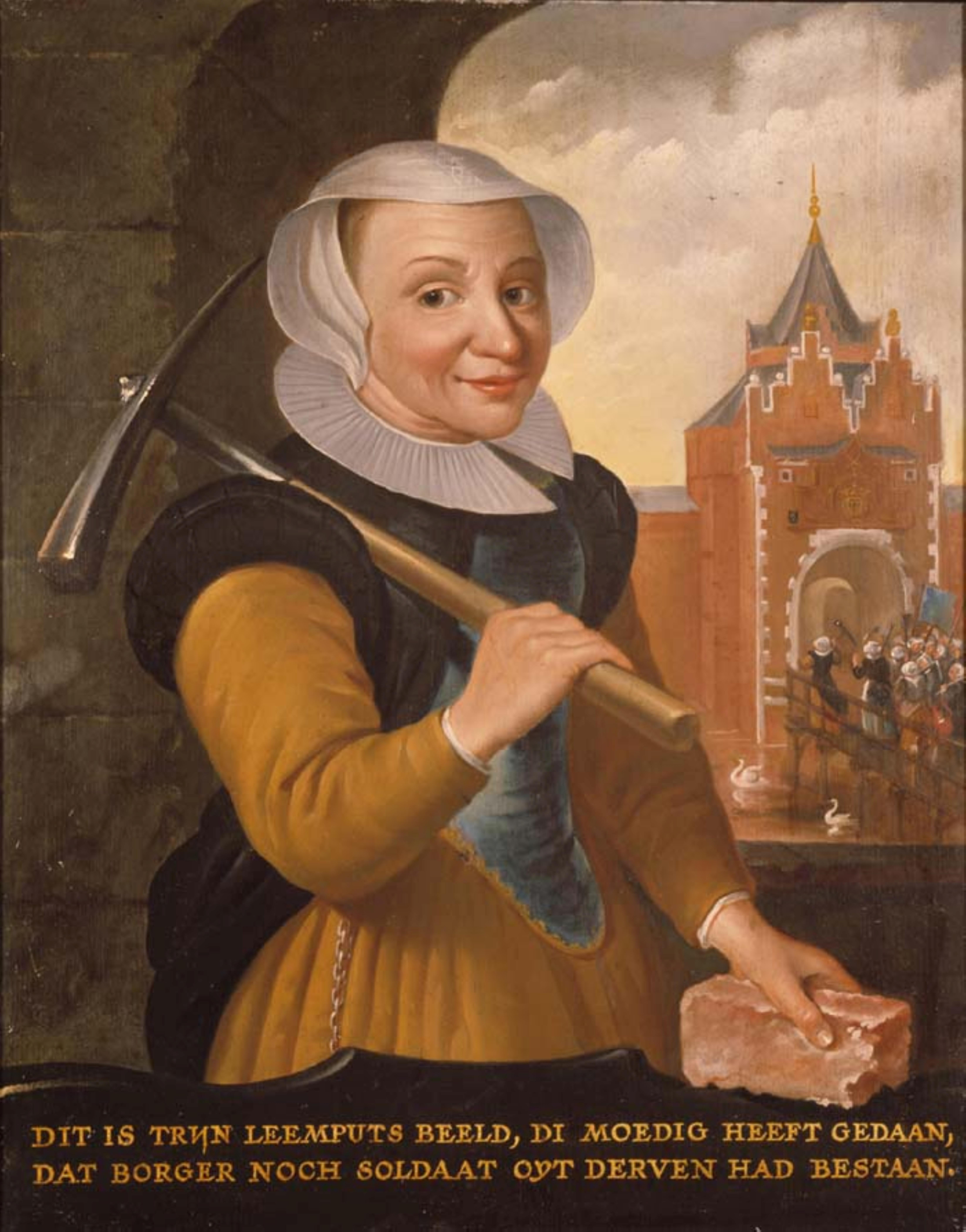 Trijn van Leemput op een schilderij uit ca. 1650 van een anonieme kunstenaar.